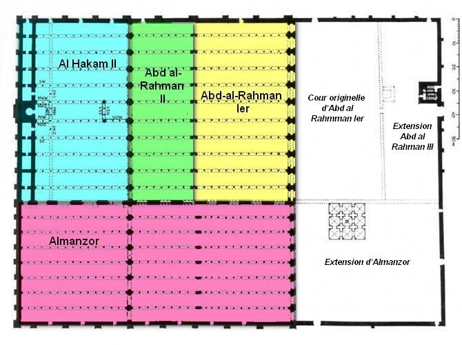 Planta de la mezquita de Córdoba antes de 1236